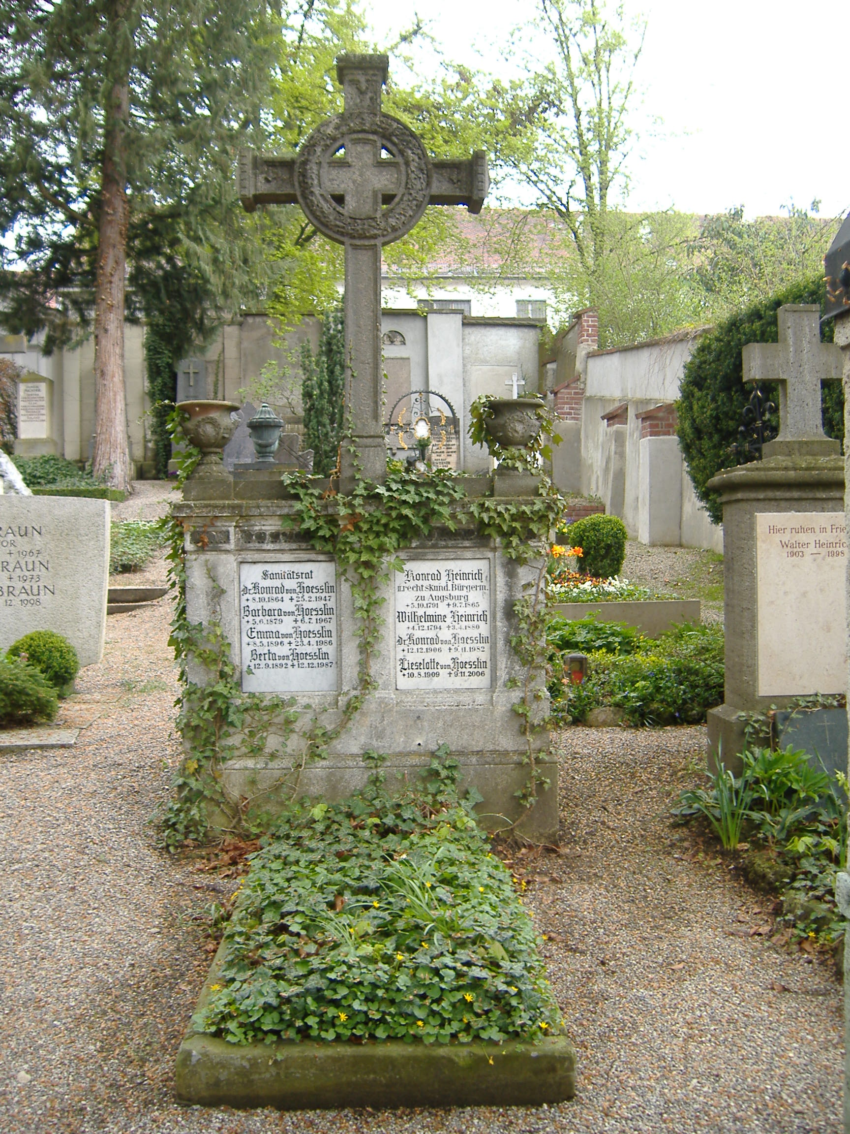 Familiengrab Hoesslin